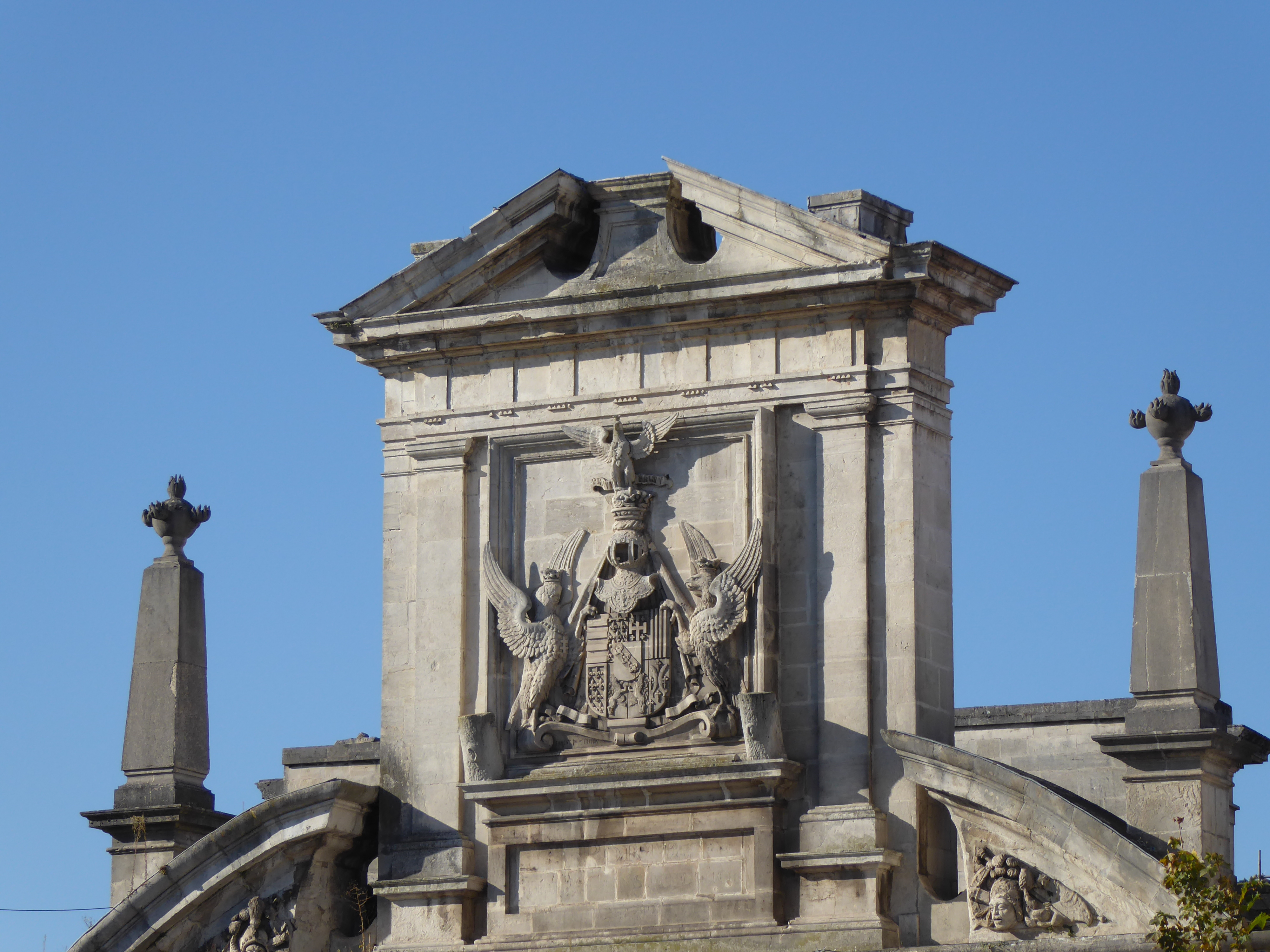 Détail de la porte Saint-Nicolas à Nancy. La porte est édifiée de 1603 à 1608, sous le règne de Charles III. Son fronton est décoré, côté faubourg au sud, aux armes du duc de Lorraine René II, vainqueur en 1477 du duc de Bourgogne Charles le Téméraire lors de la bataille de Nancy. Deux alérions portant couronne tiennent l'écu sur lequel figurent les armoiries de René II et qui est surmonté de son heaume couronné. Un troisième alérion est posé au dessus, devant un phylactère portant le cri de guerre de la Maison de Lorraine : "Priny, Priny". Les deux obélisques encadrant le fronton ont été ajoutés en 1865 lors du remaniement ayant remplacé l'unique ouverture centrale par deux portes en plein cintre. .